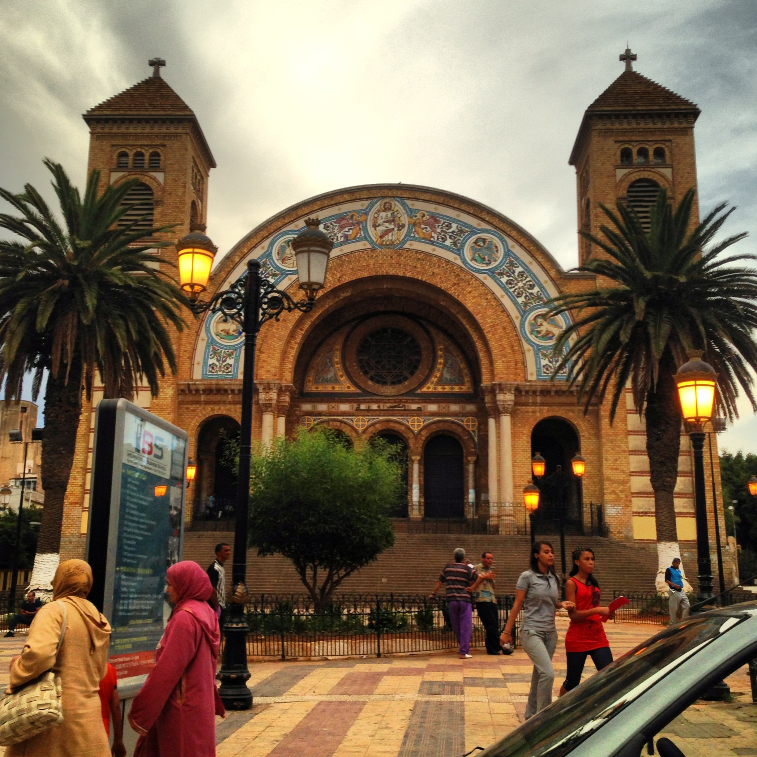 كاتدرائيّة وهران ذات الطّراز الرّومانيّ-البيزنطيّ الّتي تبرز معالمها بالهندسة المعماريّة للمبنى والزّخرفة الشّرقيّة، بنيت بين الأعوام ١٩٠٤-١٩١٣، وافتتحت عام ١٩١٨، ولكن بعد استقلال الجزائر أُهملت حتّى عام ١٩٨٤ لتحوّلها السّلطات إلى مكتبة إقليميّة، ثمّ مكتبة عامّة عام ١٩٩٦. تاريخ الصورة 16_10_2013